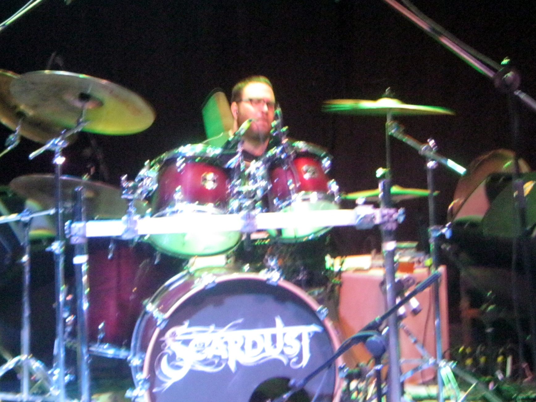 Prey For Nothing Vs Scardust - Metal Fight 02.06.16, Israel